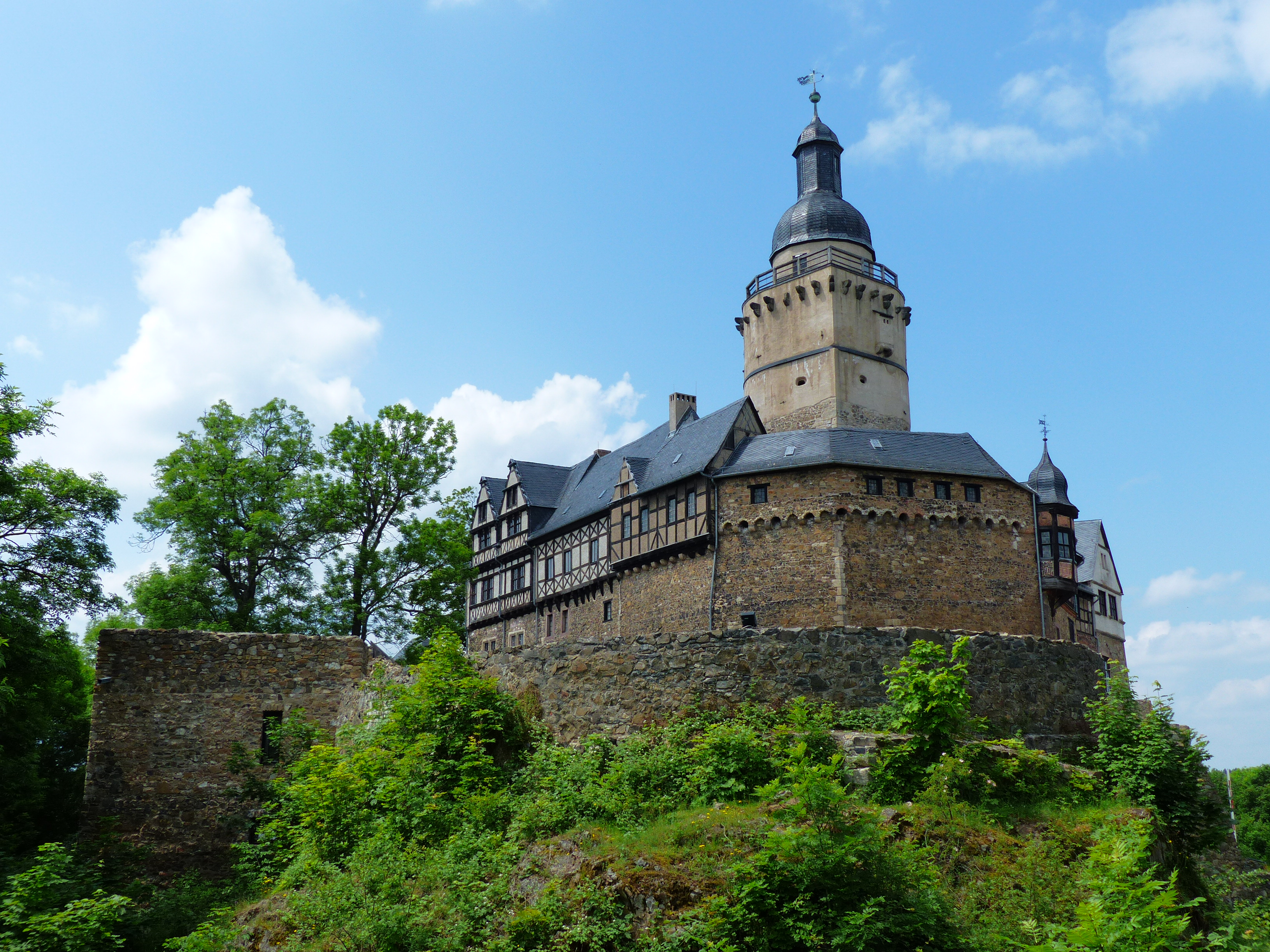 Burg Falkenstein im Harz: Die Schildmauerseite im Osten über den Halsgräben